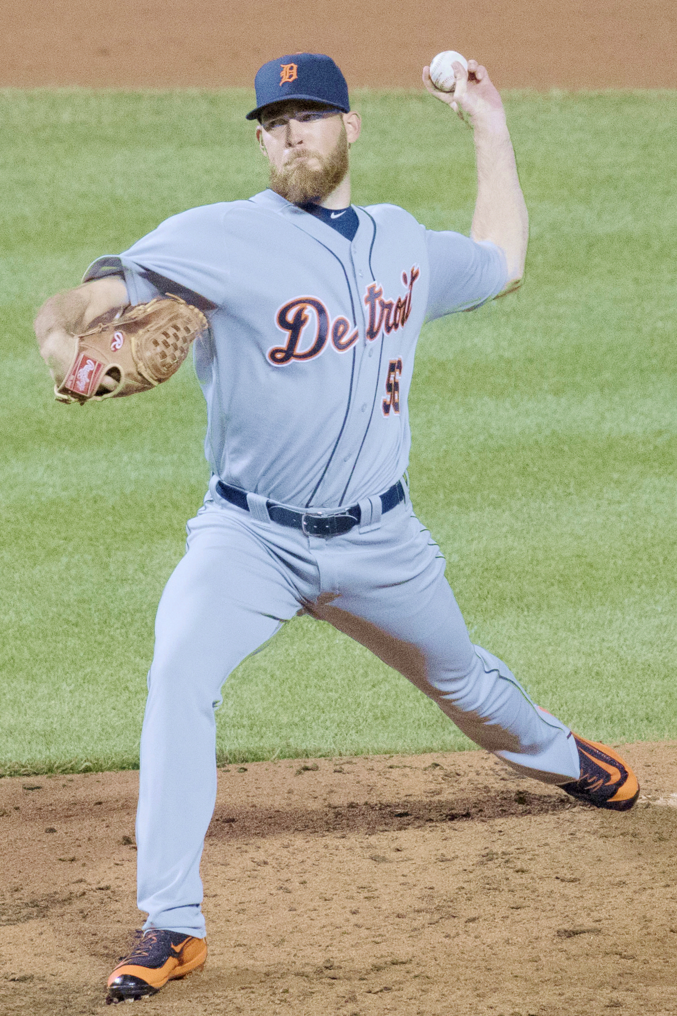 Kyle Ryan